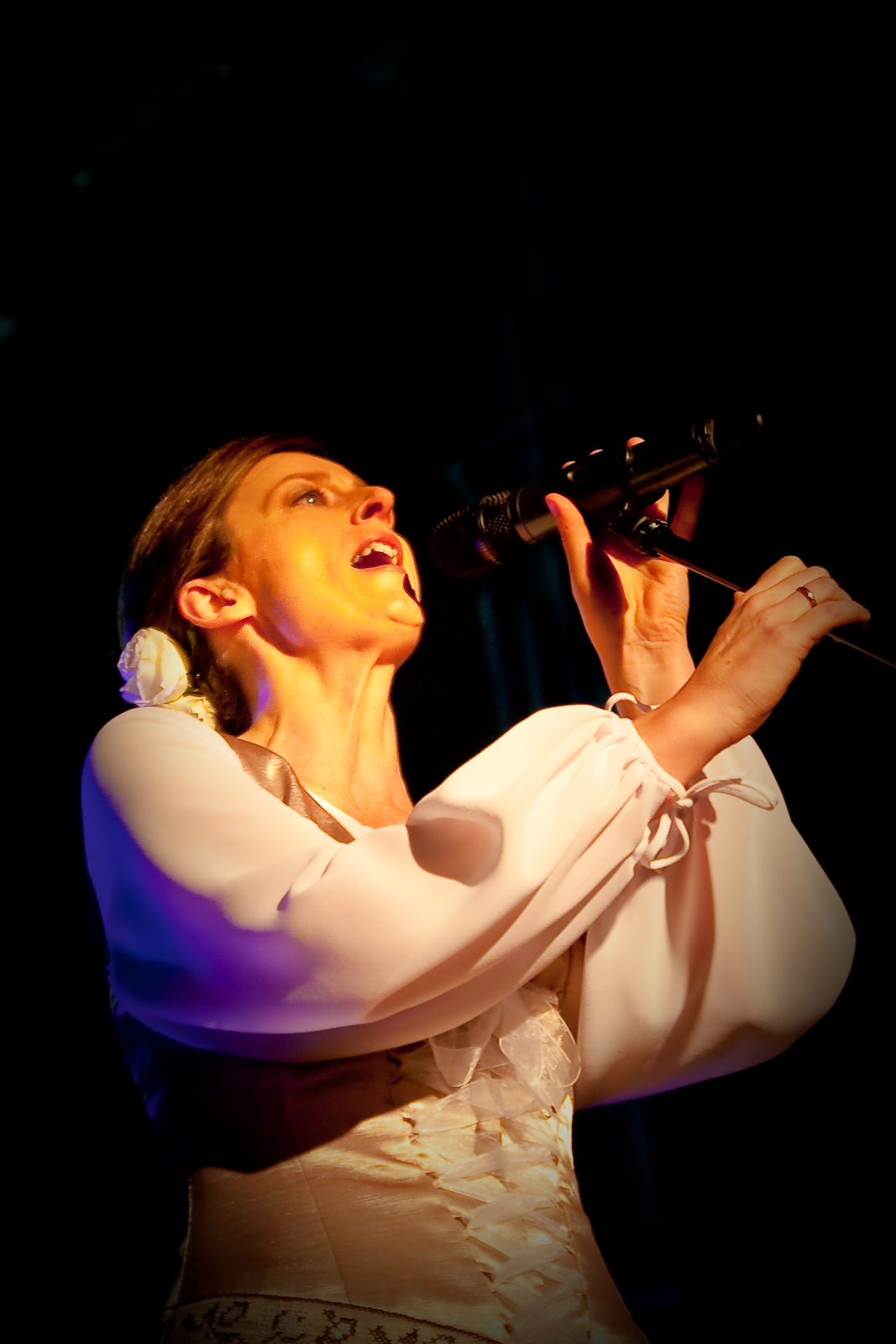 Ola Turkiewicz na IV Koncercie Niepodległosci. Fot.Dawid Korczyński